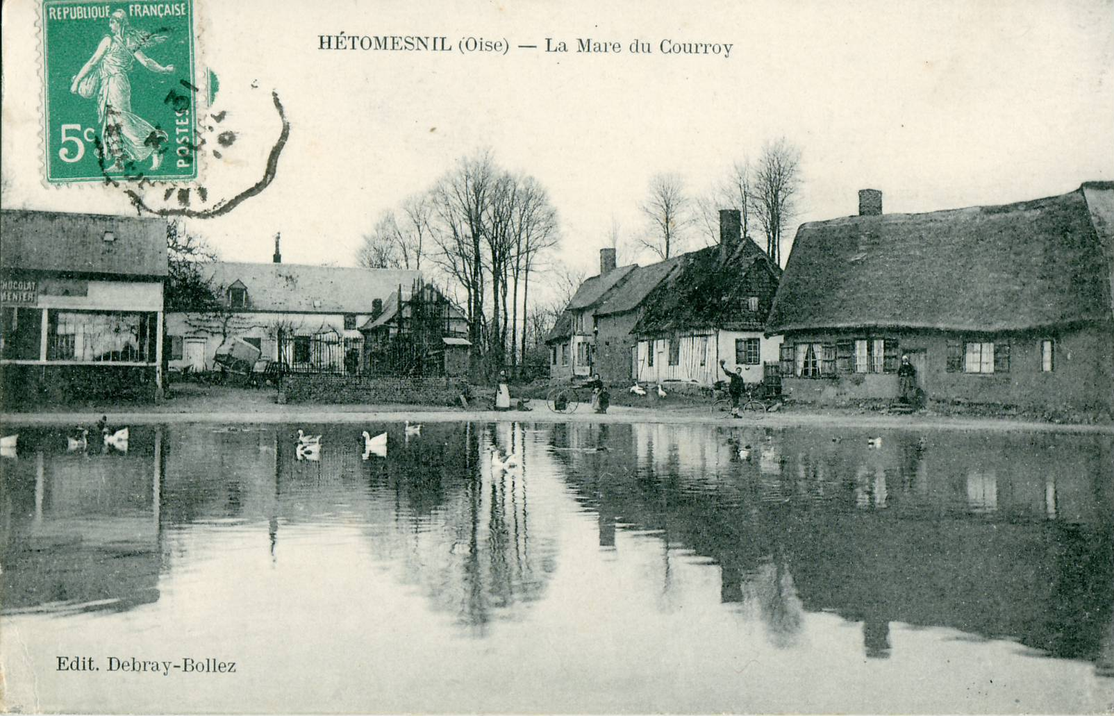 Carte postale ancienne éditée par Debray-Bollez, éditeur à Crèvecœur-le-GrandHETOMESNIL - La marre du Courroy